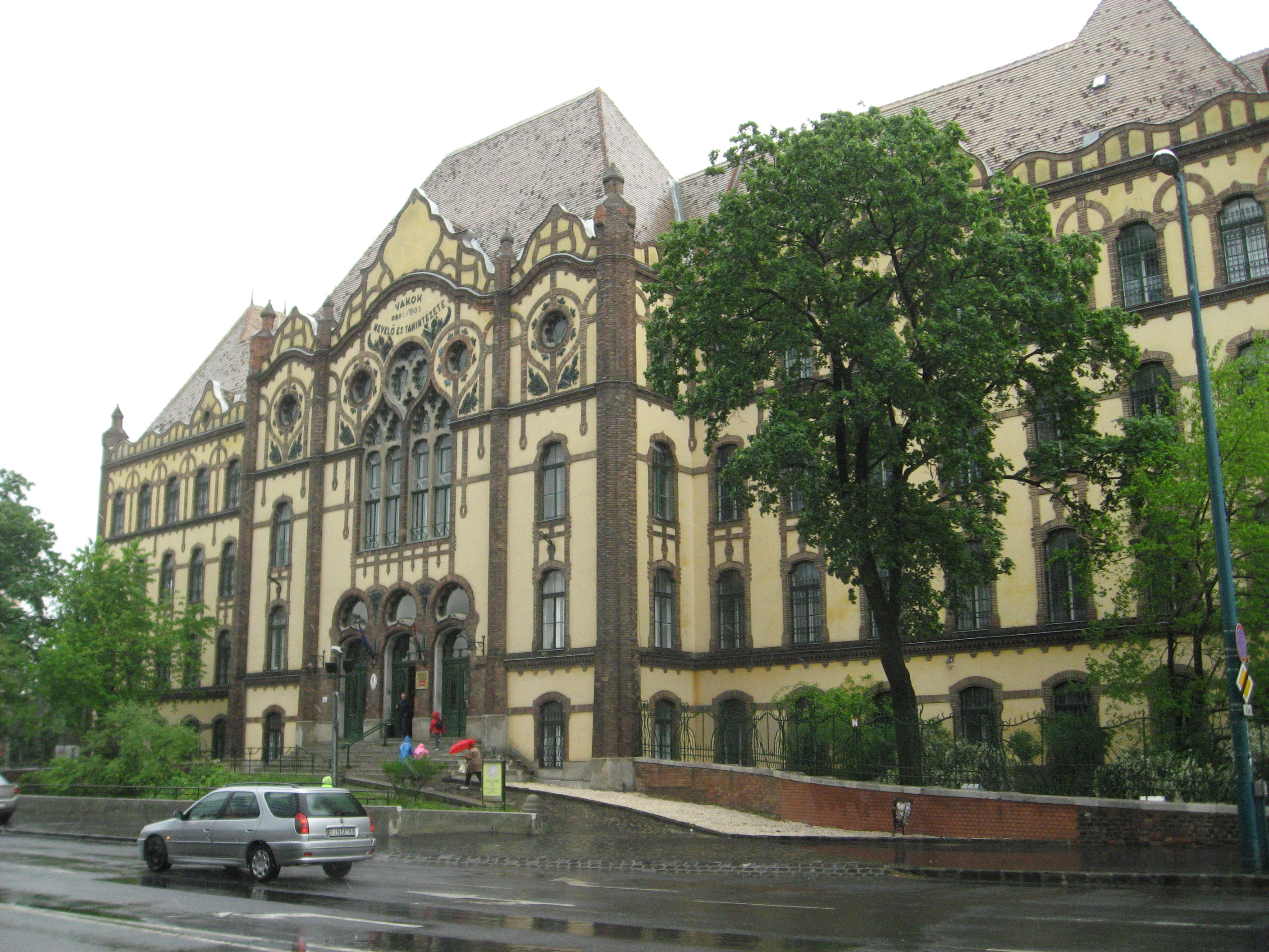 Budapešť